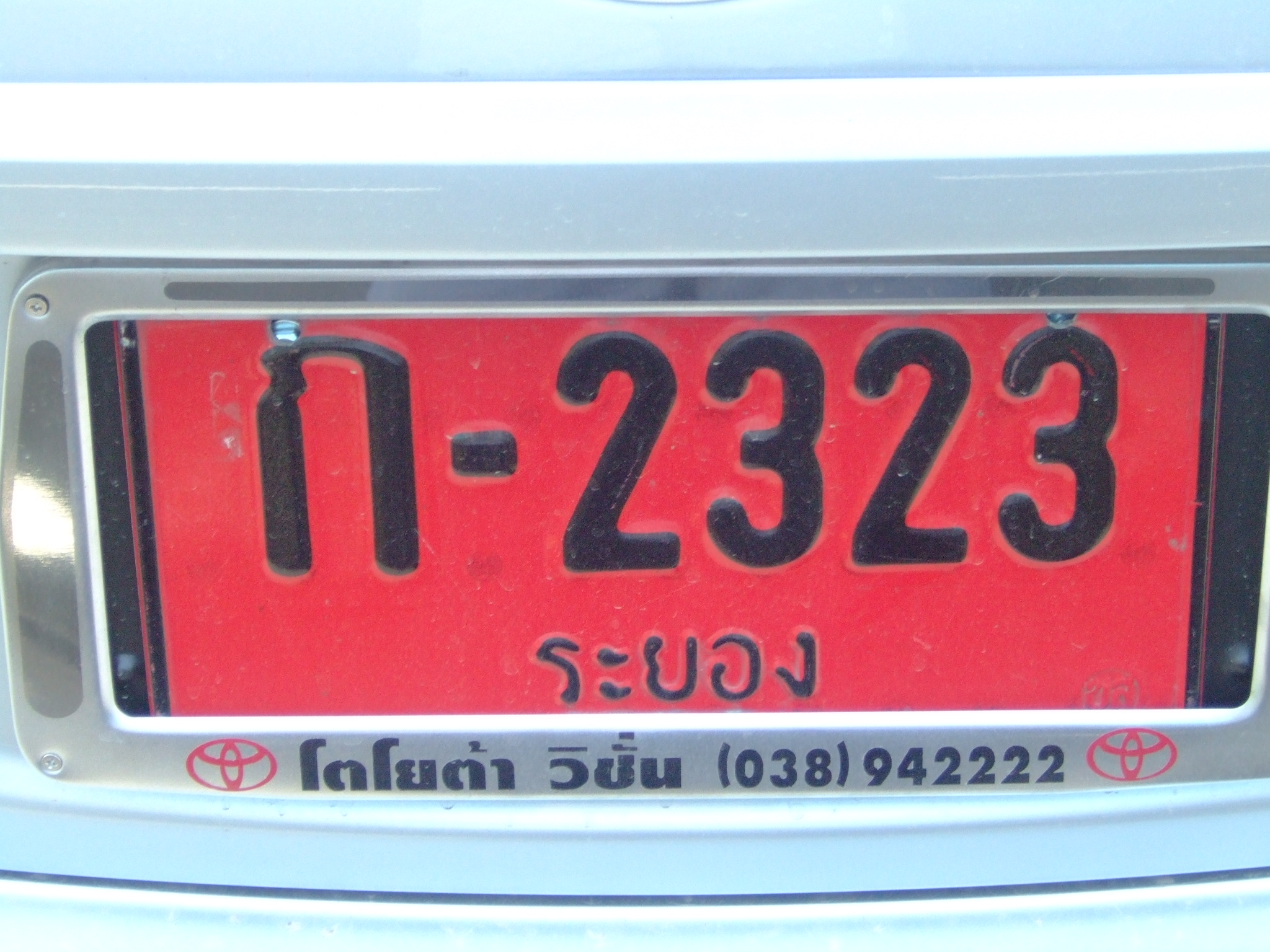 Foto propria - Novembre 2009